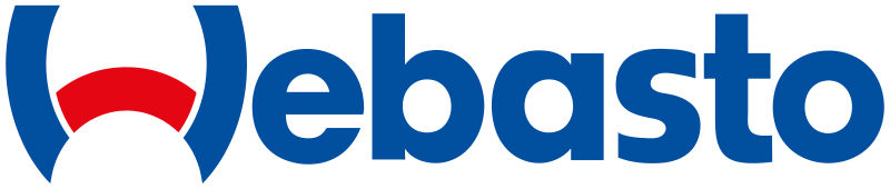 Официальный логотип компании